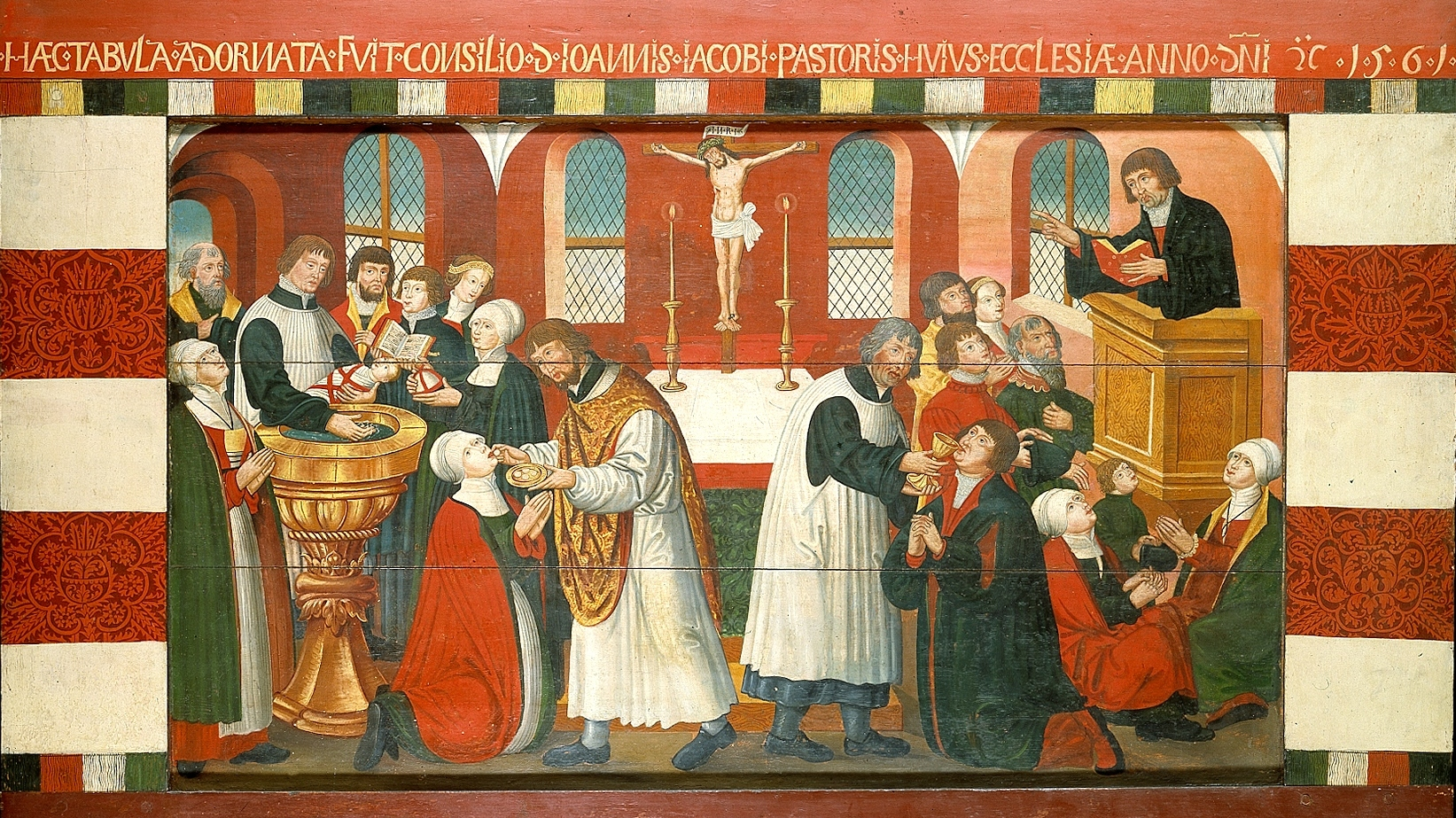 Alterbordsforside fra Torslunde Kirke på Sjælland. Tavlen viser hovedpunkterne i den protestantiske gudstjeneste: barnedåb, prædiken og nadver.Alterbordsforsiden fra Torslunde Kirke bærer en latinsk indskrift, som i oversættelse lyder: Denne tavle blev udsmykket efter råd af Hr. Johannes Jacobsen, præst ved denne kirke, i det Herrens år 1561. Kunstneren er ukendt, men forlægget for billedet er et stik af Lucas Cranach af den lutherske gudstjeneste sat op overfor en satirisk gengivelse af den katolske messe. Maleren i Torslunde nøjedes med at male den positive del, altså de centrale elementer i den lutherske gudstjeneste: de to sakramenter dåb og nadver, samt prædikenen. På det tyske propagandastik er det Luther selv, der står på prædikestolen, men i Torslunde er det en almindelig præst, som måske skal forestille sognepræsten Johannes Jacobsen. Datering: 1561.